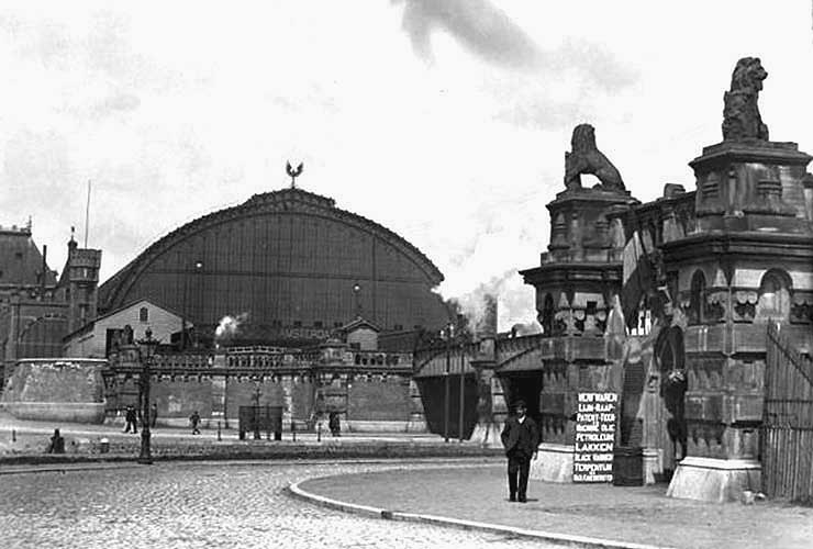 Oostertoegang bij Centraal Station Amsterdam.